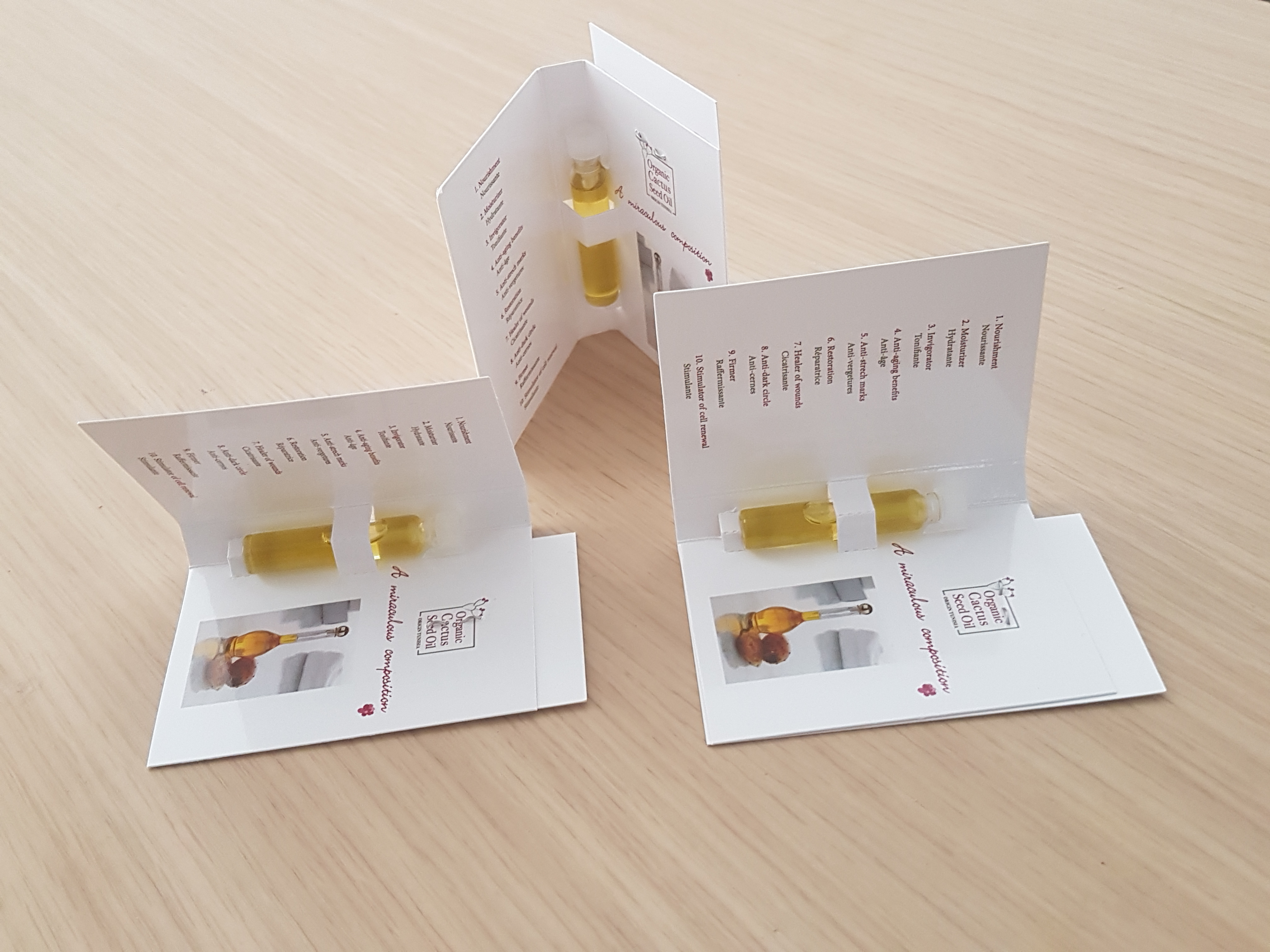 L'huile de figue de barbarie